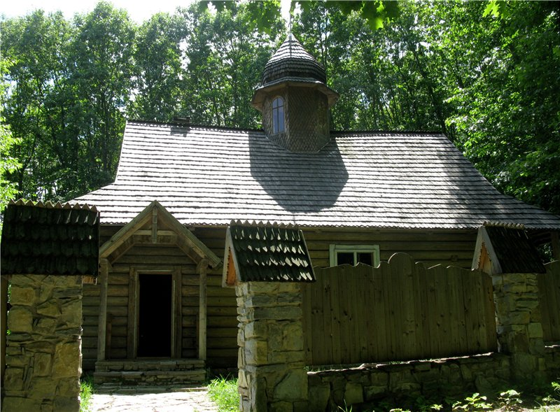 Дерев'яна церква початку ХХ століття з села Поплавники Галицького району у музеї народної архітектури та побуту Прикарпаття в Крилосі (Україна, Івано-Франківська обл.)